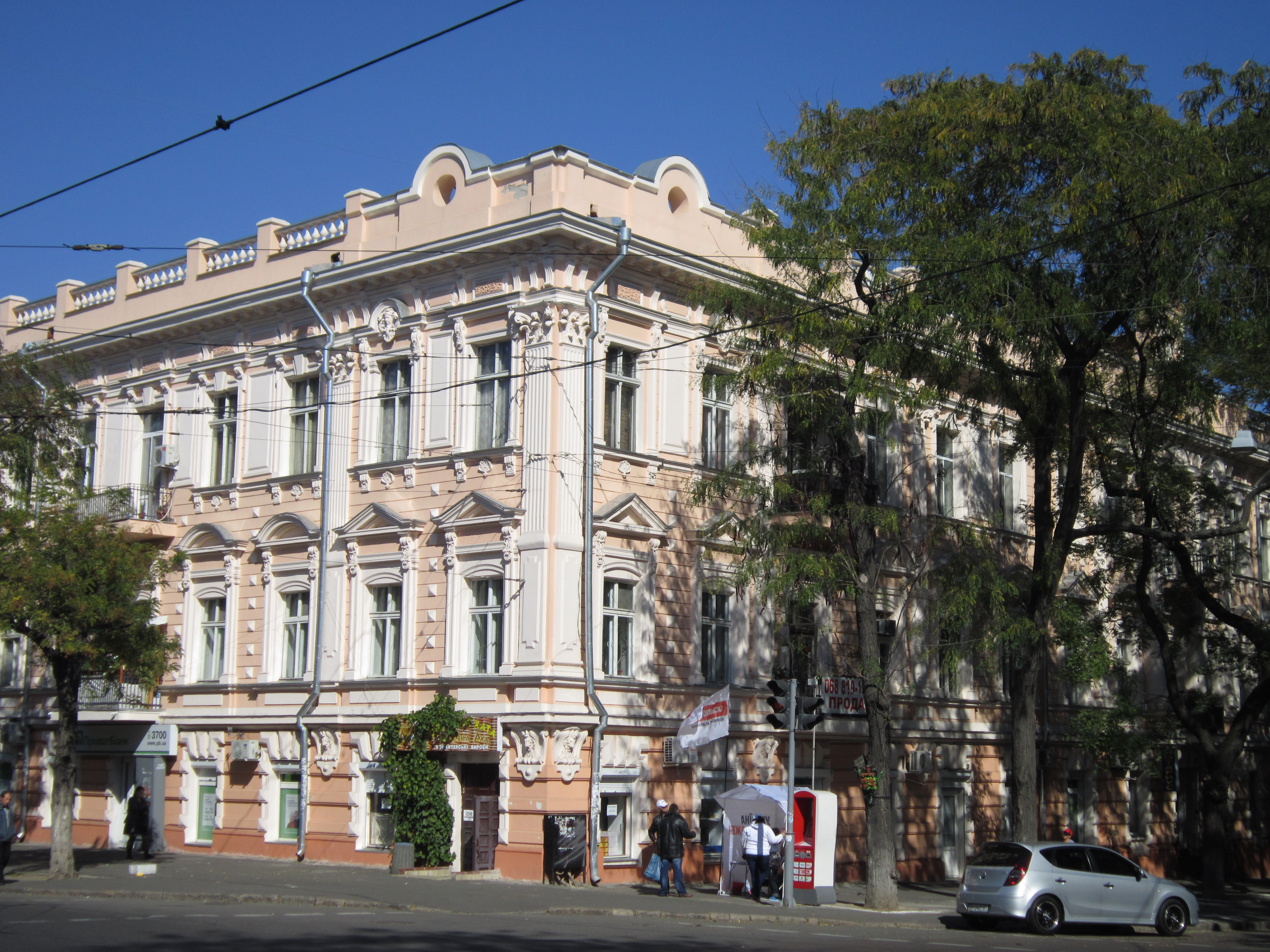 Житловий комплекс Шретера, в якому жили:- Л.І. Мандельштам - фізик, академік АН СРСР, Лауреат Держ.премії СРСР, оди із засновників Одеського політехнічного інституту;- С.І. Шатуновський - математик, засновник та керівник Одеської математичної школи, професор;- І.Є. Тамм - фізик, Герой Соц. Праці, Лауреат Держ.премії СРСР, академік АН СРСР ;- Ф.Н. Шведов – вчений-фізик, ректор Новоросійського університету в 1895-1903 рр., професор; - Ф.М. Породко - вчений-ботанік, професор;- А.С. Комаровський - фармаколог, професор;- І.С. Некрасов - доктор Російської словесності, ректор Новоросійського університету;- О.В. Никитський - еллініст, акад. Російської АН- І.С. Бериташвілі - фізіолог, академік АН СРСР, АМН СРСР, АН ГРСР, Герой Соціалістичної праці, лауреат Держ. премії СРСР, почесний член Нью-Йоркської АН АН;- А.О. Богуславський - литературовед, чл.-кор. АН СРСР;- В.І. Вронський - балетмейстер, н.а. СРСР;- Г.І. Гіммельфарб - професор-хірург;- С.В. Циганов - фармаколог, професор; - І.В. Новопокровський -академік АН ГРСР, засл.діяч науки РРСФР, професор;- П.П. Кавтарадзе - академік АН ГРСР, засл. діяч науки ГРСР;- В.І. Атрощенко - хімік-технолог, академік АН УРСР, Одеса, Пастера вул., 19/16/4 (ріг вулиць Пастера, 19, Торгової, 16 та Єлісаветинської, 4)